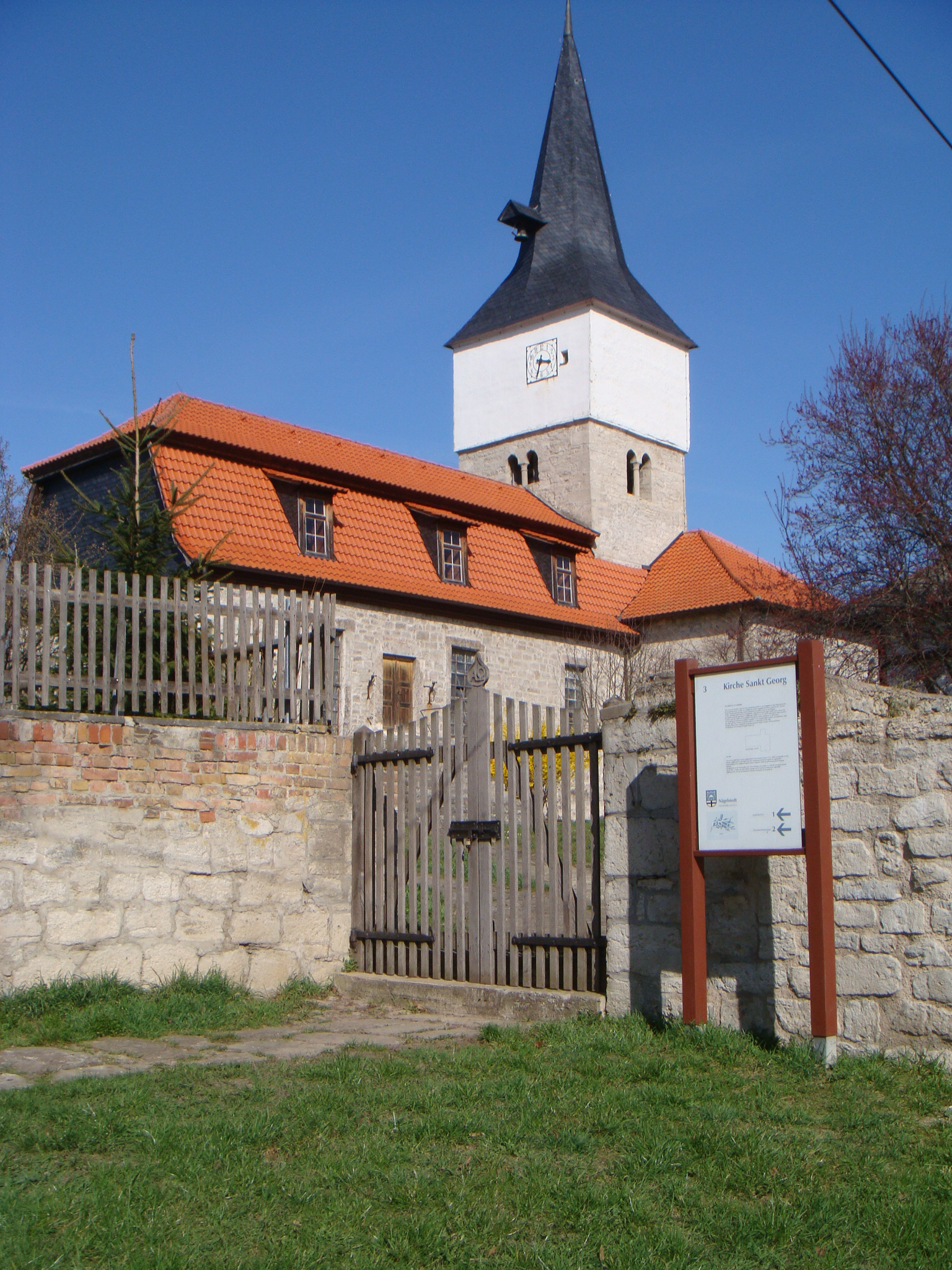 Dorfkirche Nägelstedt